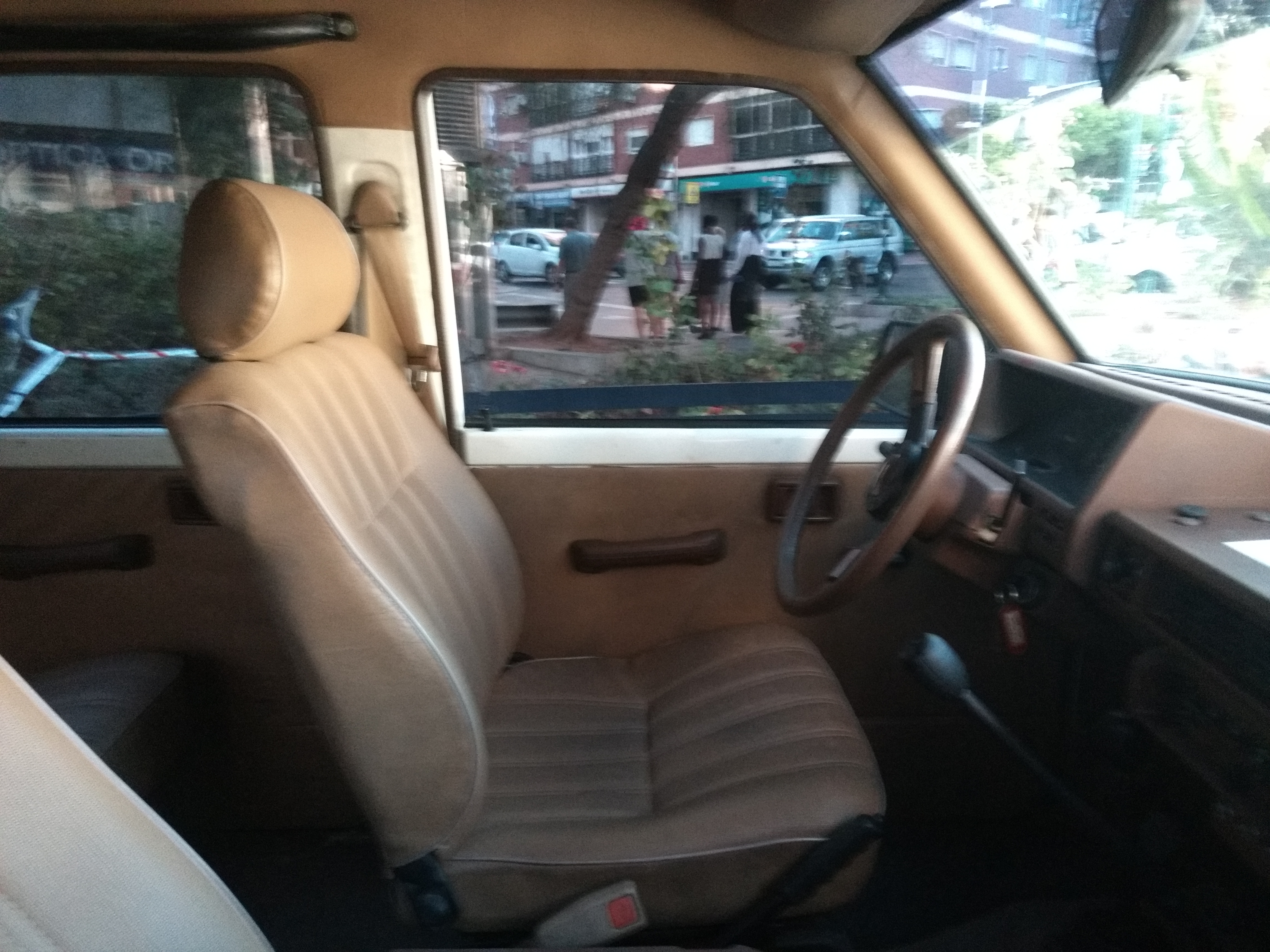 Exposición del día de la Policía. Almería (España). Septiembre de 2018